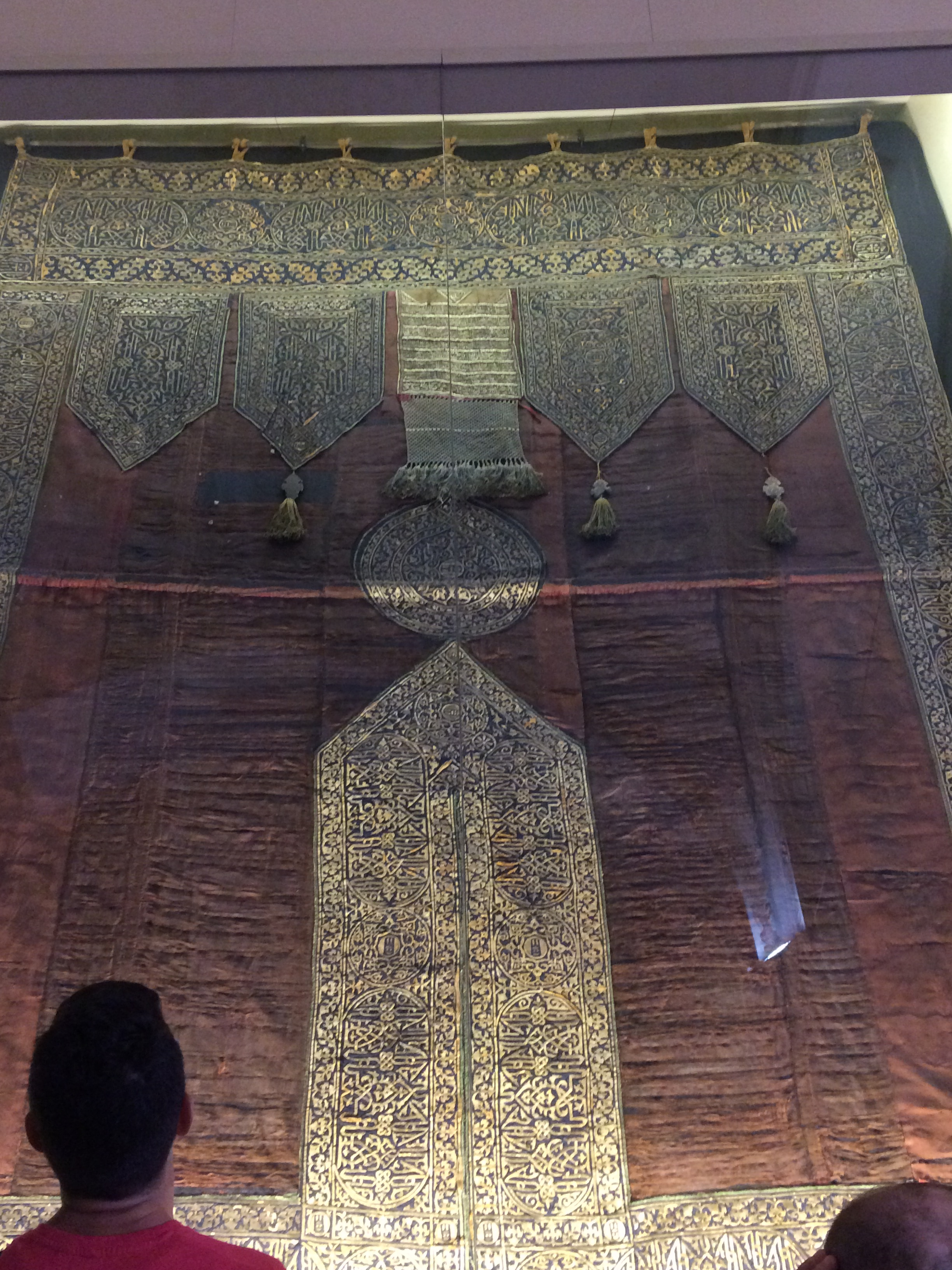 Kabe Örtüsü Bursa Ulucamii